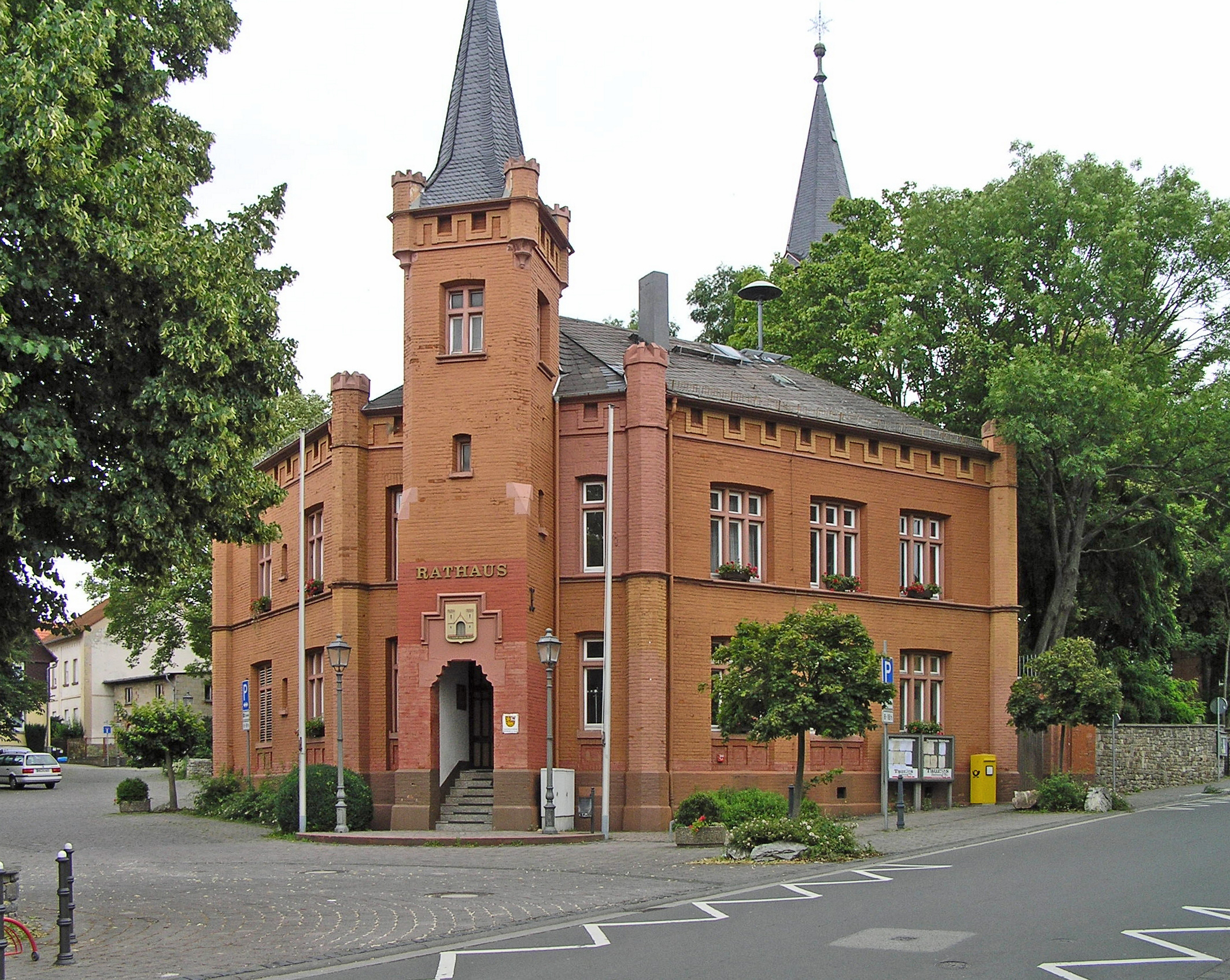 Rotes Rathaus Wehrheim (Deutschland)